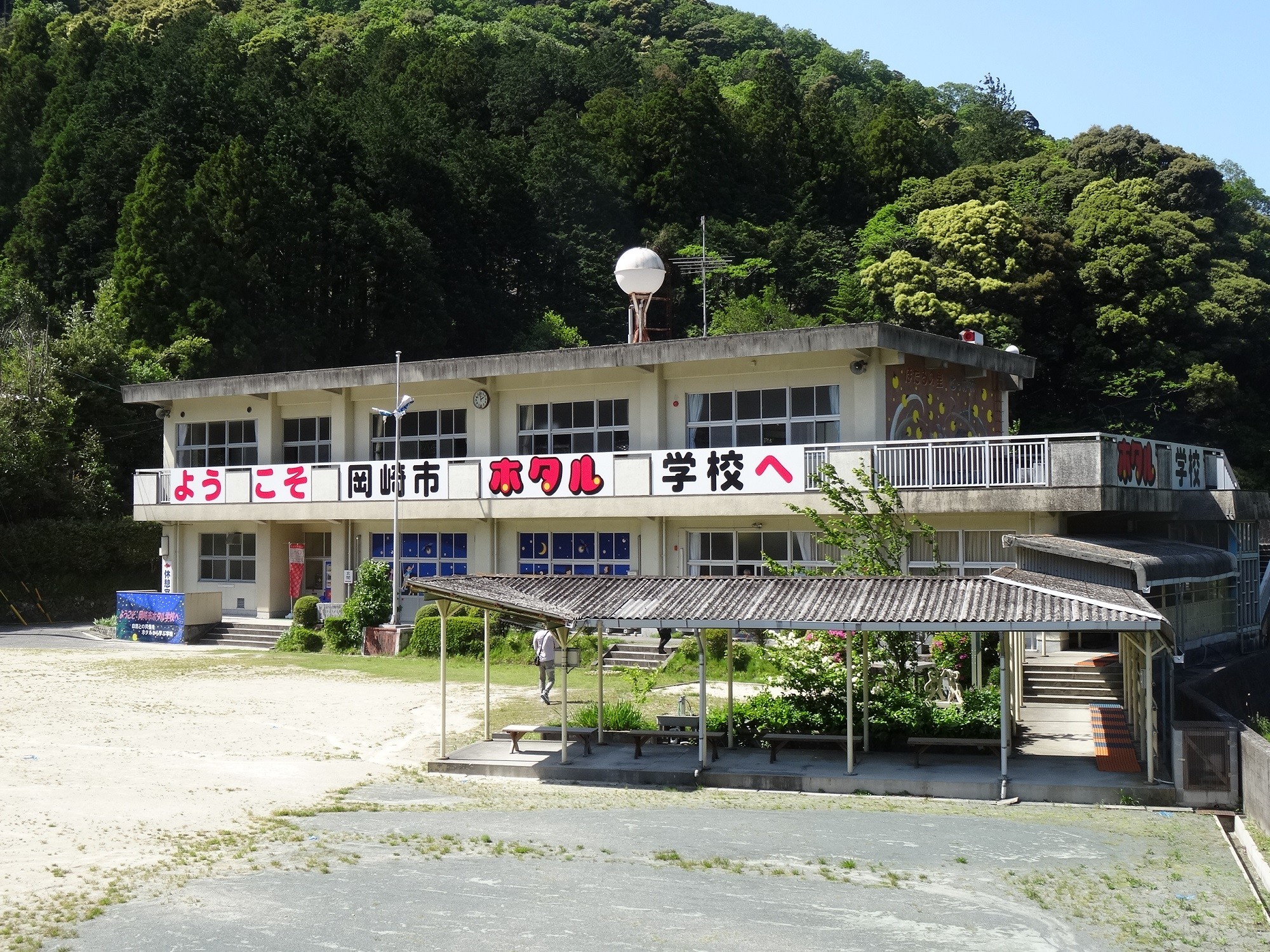 岡崎市ホタル学校（旧岡崎市立鳥川小学校）